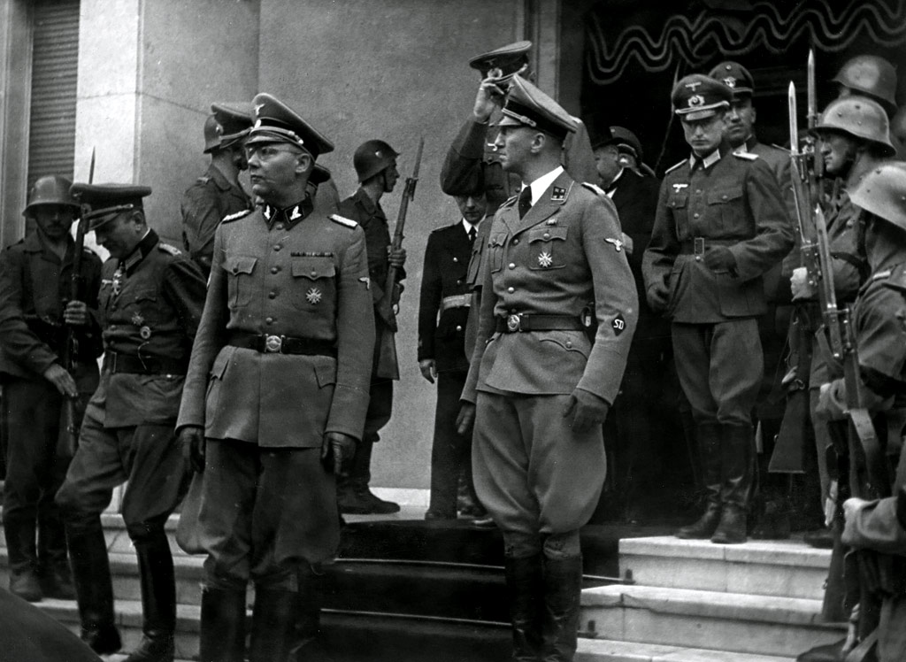 Chef der Sicherheitspolizei und des SD von Serbien SS-Oberführer Dr. Emanuel Schäfer gemeinsam mit SS-Sturmbannführer Bruno Sattler sowie weitere Offiziere verlassen die bulgarische Gesandtschaft in Belgrad an 5. September 1943, anläßlich der Beerdigungsfeier Seiner Majestät König Boris III von Bulgarien